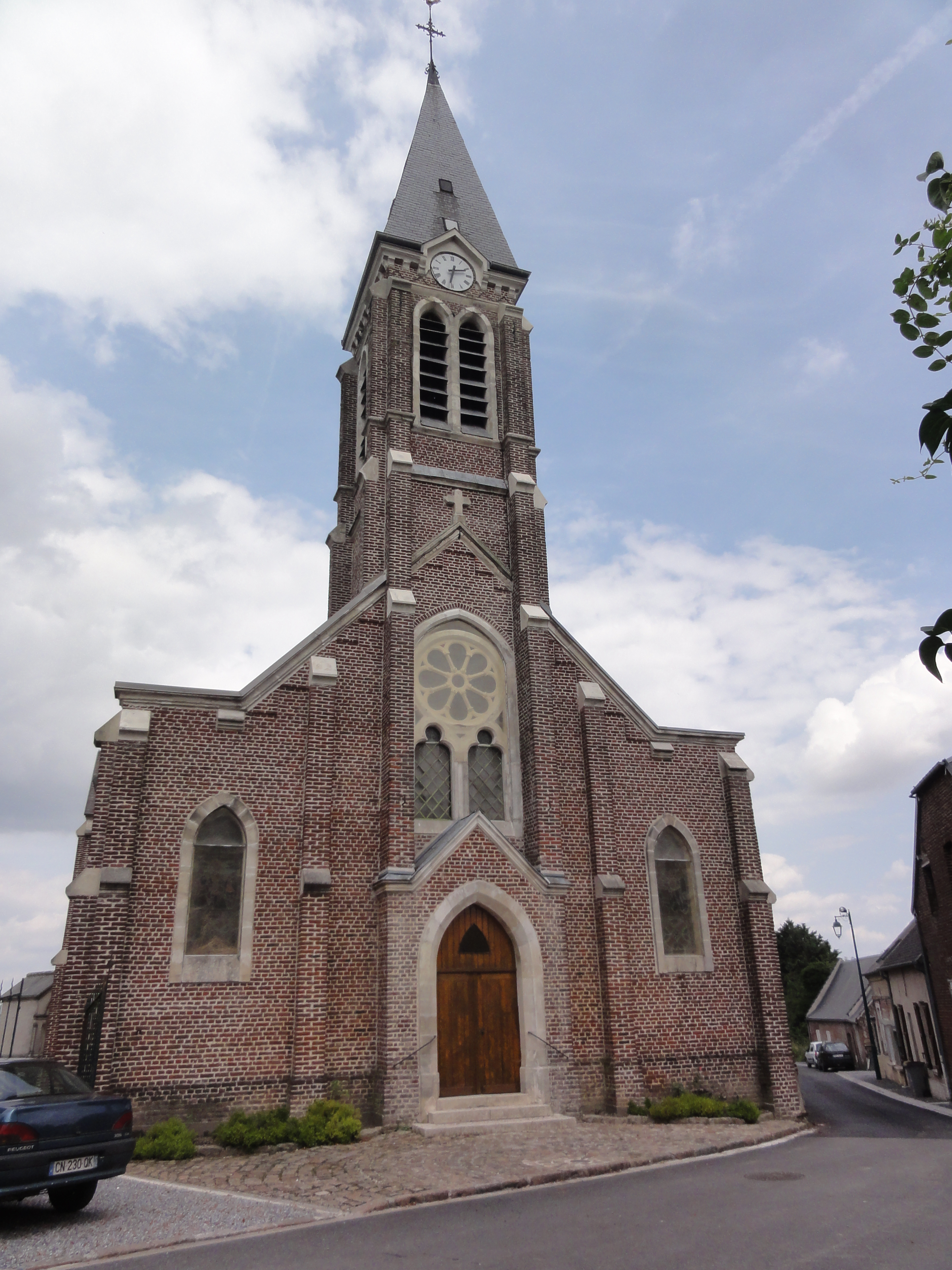 Fieulaine (Aisne) église